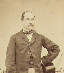 Adolf von Poche (1811 - 1893), Rakouský a český politik německé národnosti.